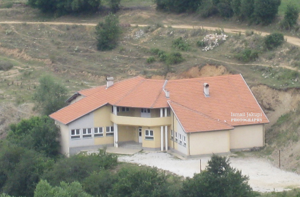 Shkolla e re në fshatin Brrut e ndërtuar në vitin 2005